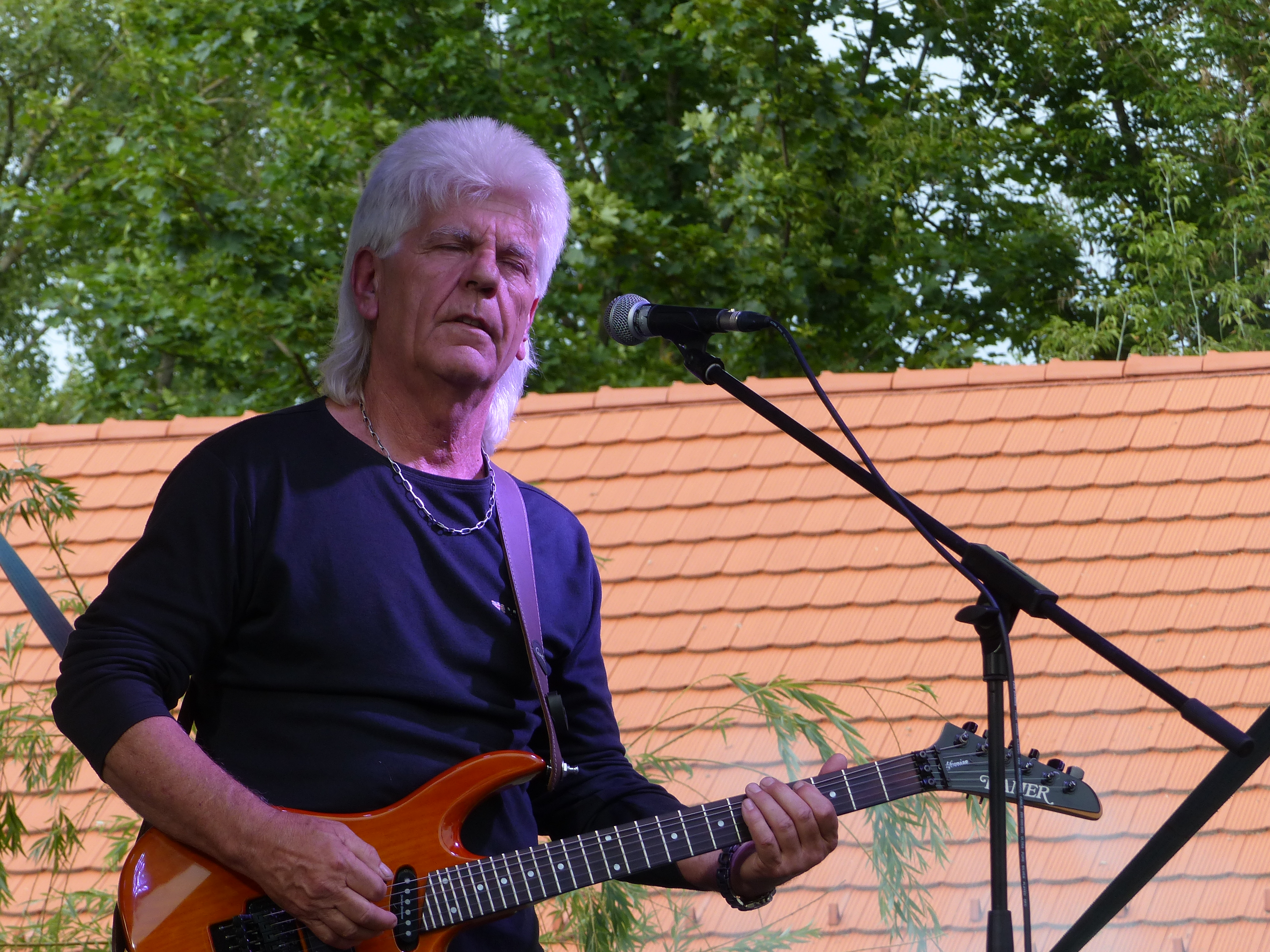 Szántai Gyula. A felvétel 2017. július 2-án készült a Balaton Fesztiválon, Balatonkenesén. Mokka Tribute együttes. Felállás: Horváth Tibor dob, Kapustka Csaba basszus, Szántai Gyula gitár, Németh László Péter ének, Esztergályos Dávid billentyűk.